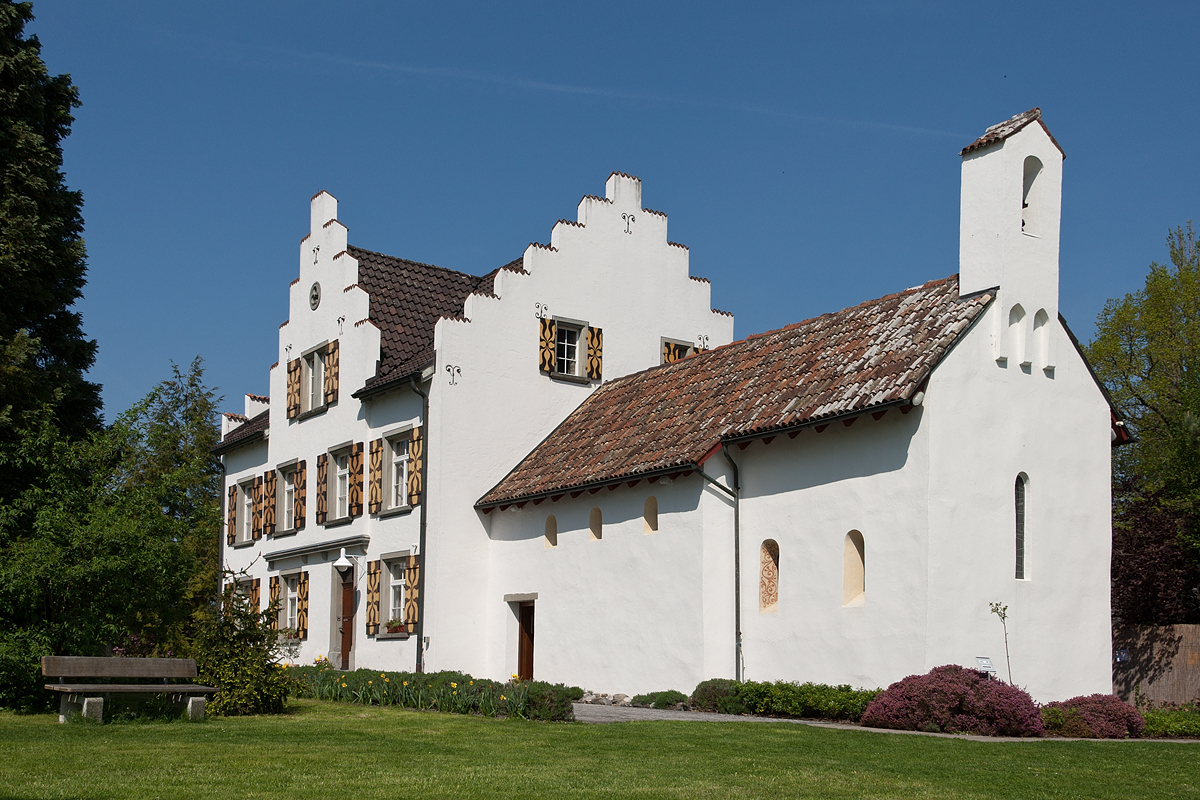 Wallfahrtskapelle St. Otmar auf der Insel Werd (Eschenz TG)